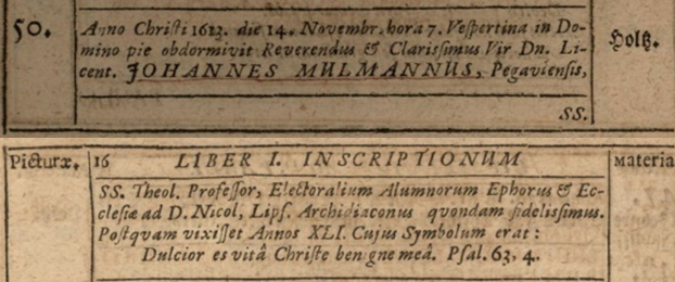 Johann Mühlmann Epitaph